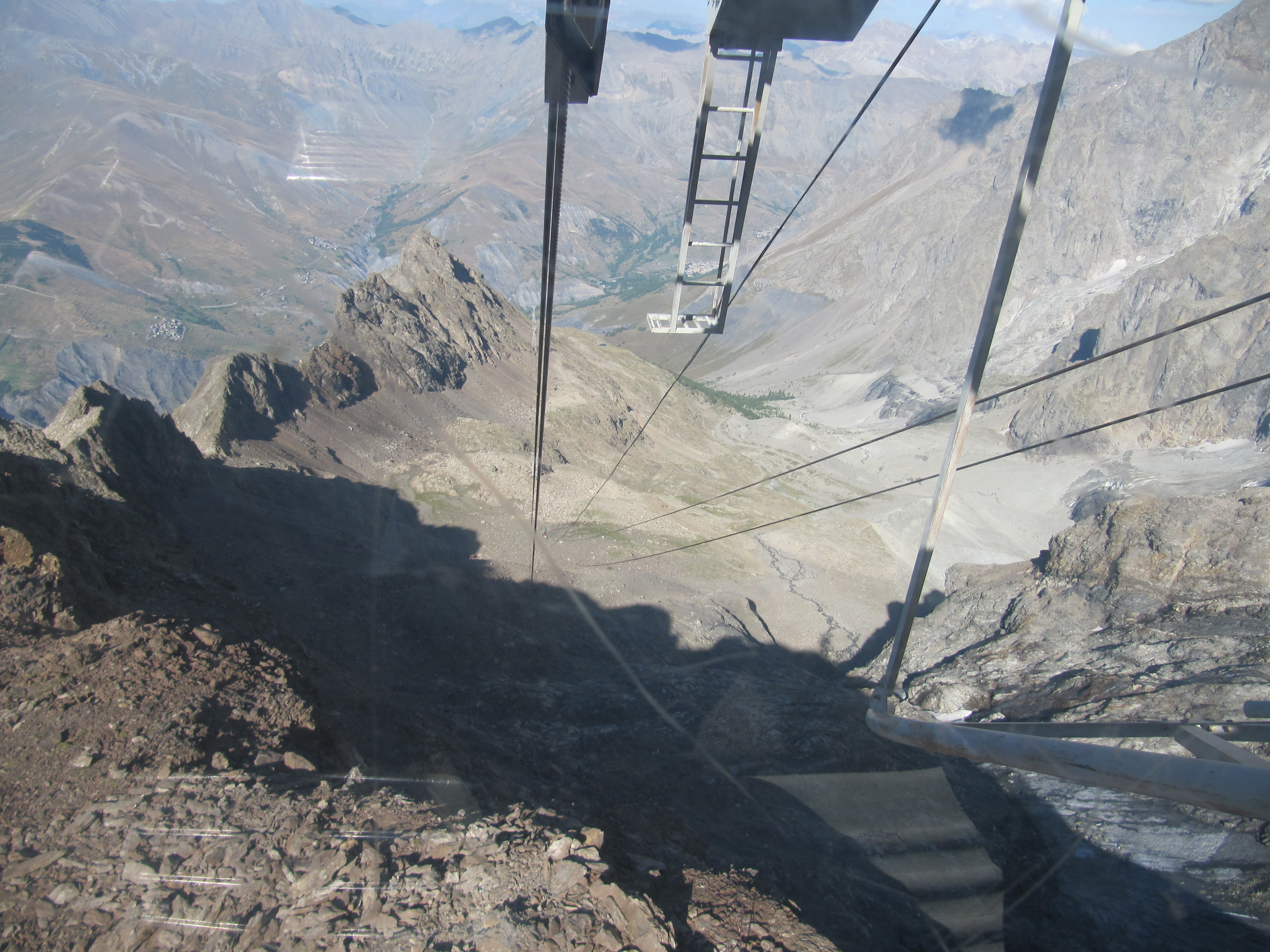 Vue sur le second tronçon du 2S Pulsé de la grave